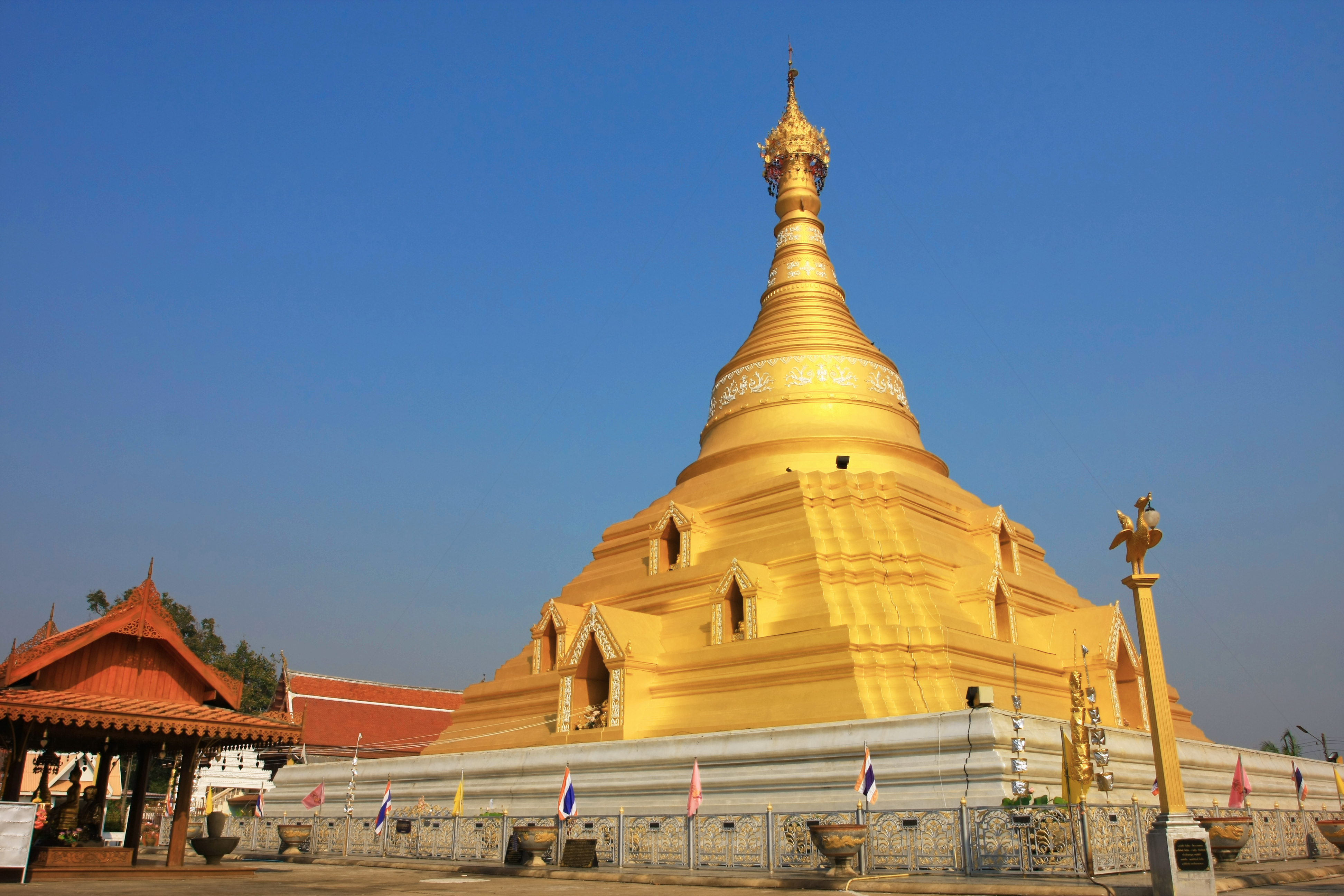 วัดพระบรมธาตุ